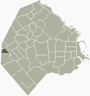 Barrio de Versalles